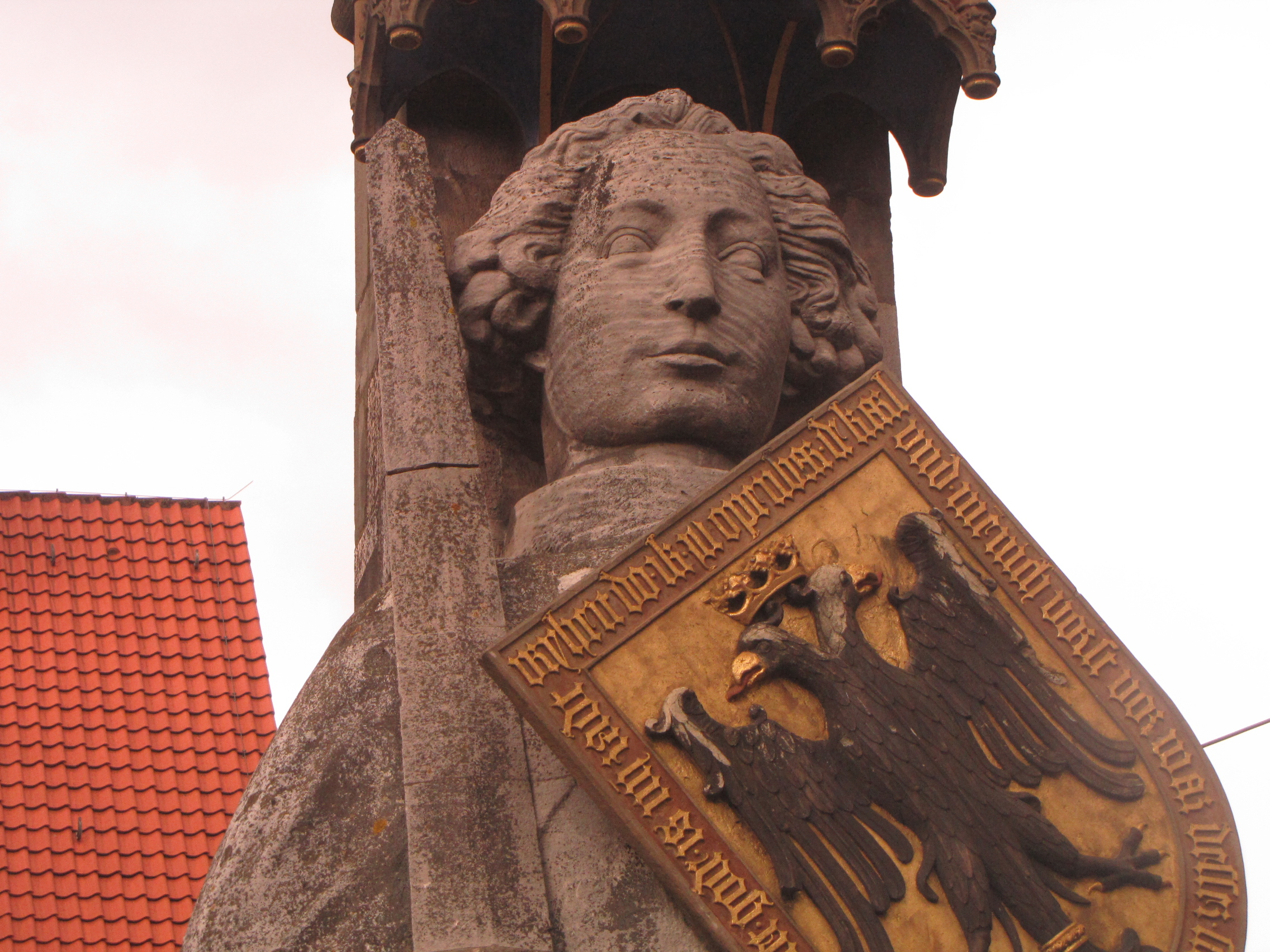 Roland in Bremen, Am MarktDas abgebildete Objekt ist ein geschütztes Kulturdenkmal in der Freien Hansestadt Bremen, mit der Nr. 0067 beim Landesamt für Denkmalpflege registriert.